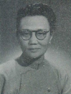 中國人民政治協商會議第一屆全體會議代表